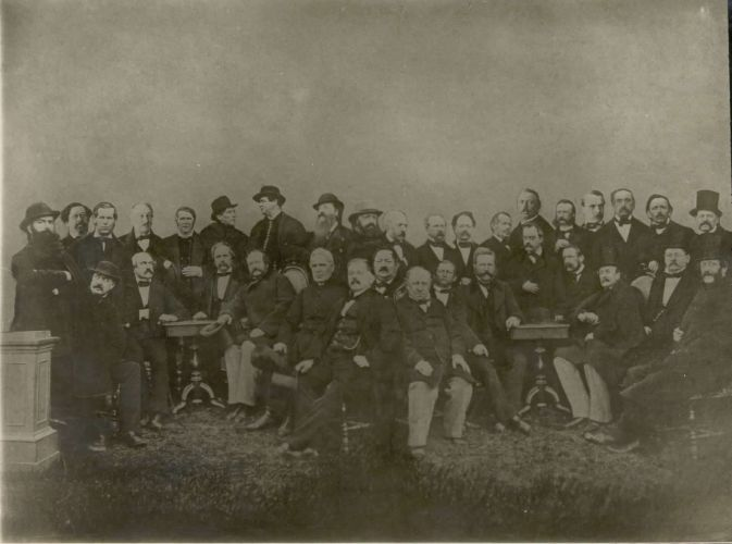 Prvi Kranjski deželni zbor